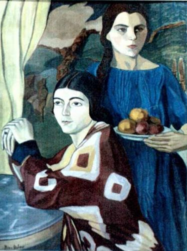 Doua surori (1925). Expusa in colectia "EGAL. Artă și feminism în România modernă" Muzeul National de Arta al Romaniei